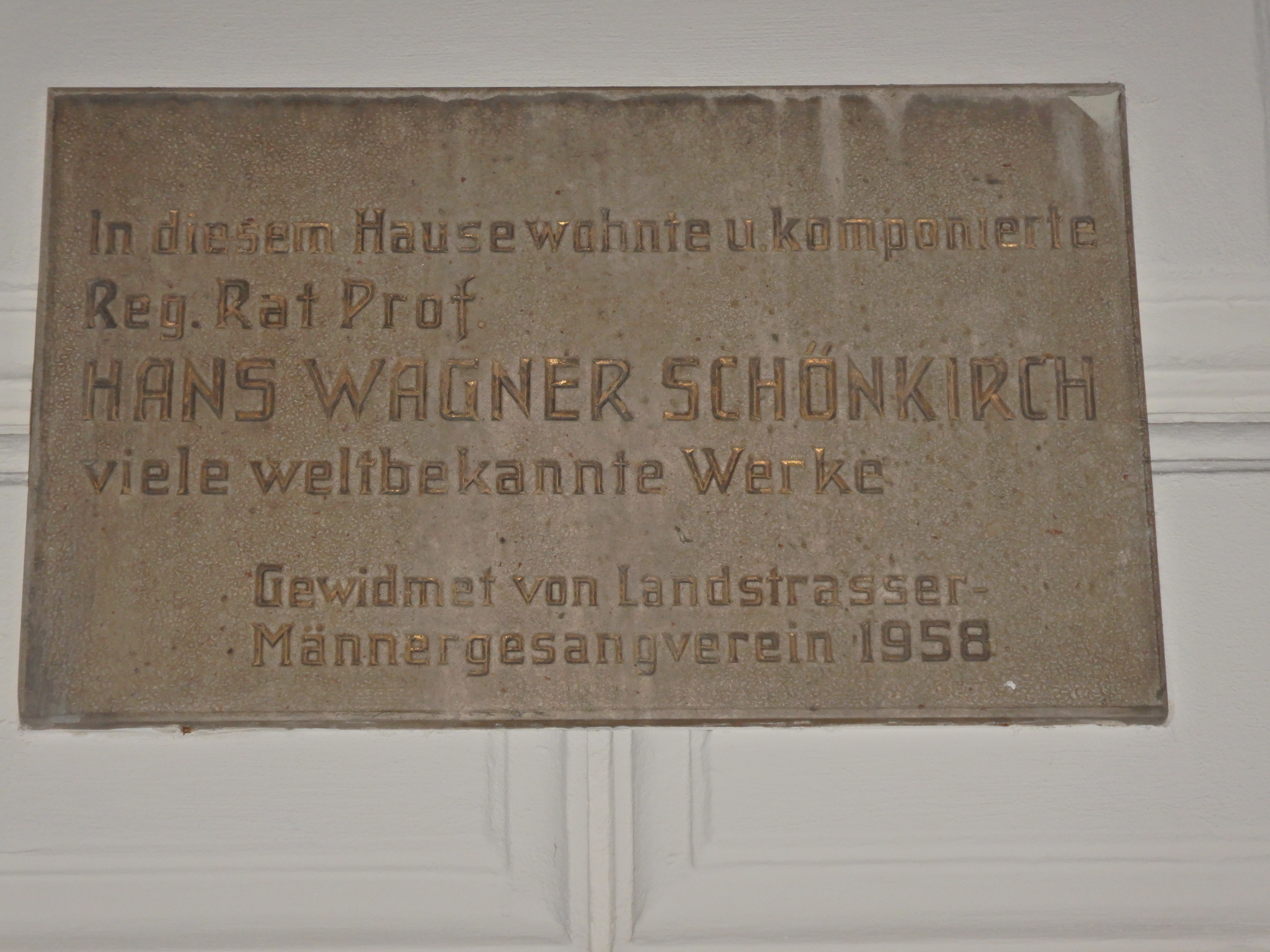 Gedenktafel für Hans Wagner-Schönkirch (Wien, Kundmanngasse 12)